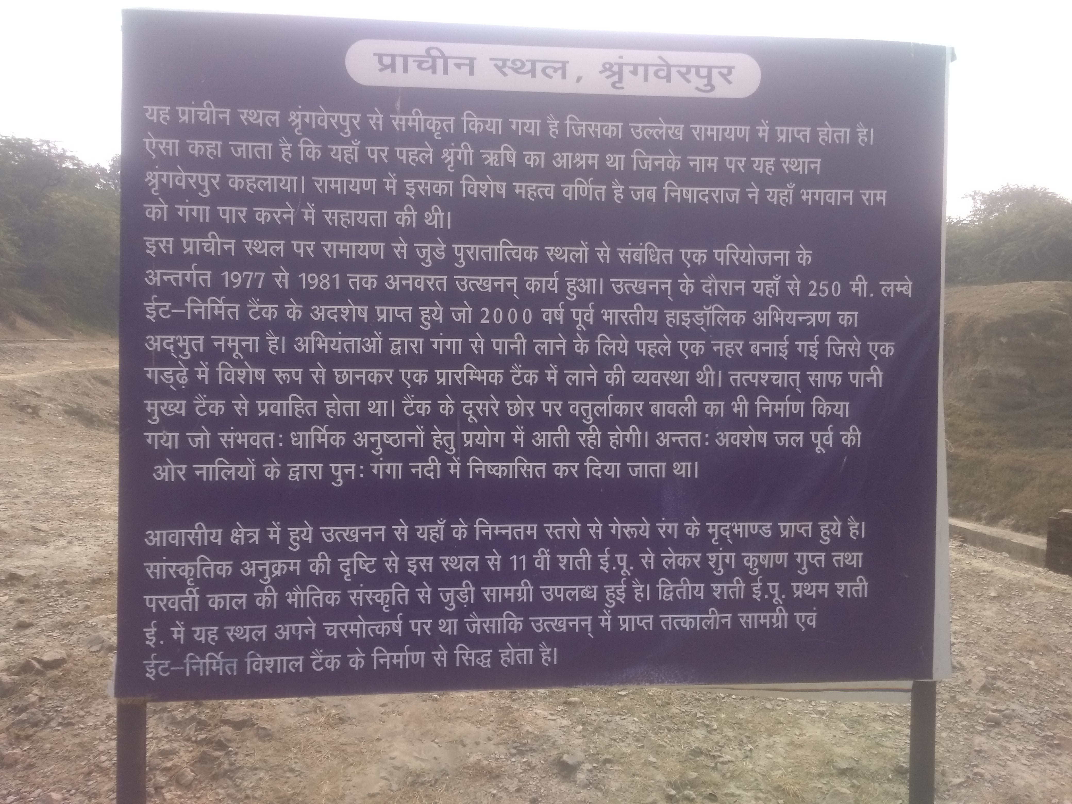 Shringverpur me lage board me Jankari